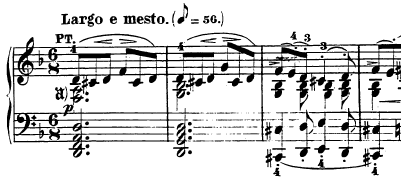 Compassos iniciais do segundo movimento da Sonata para piano n.º 7, Op. 10 nº 3 de Ludwig van Beethoven